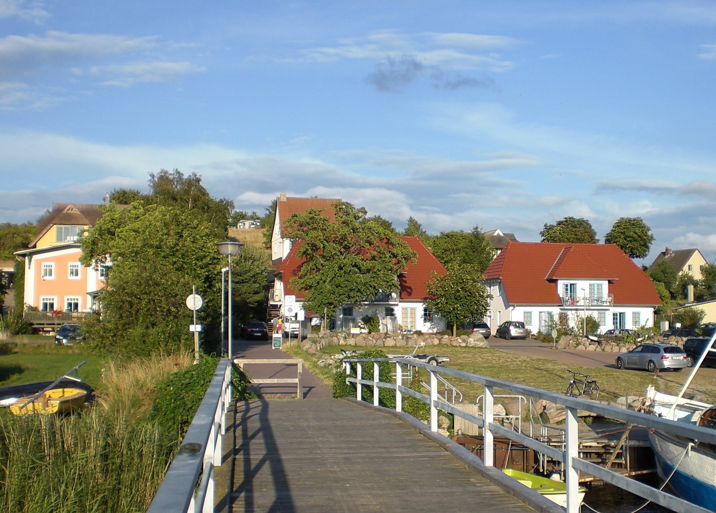 Seeedorf auf Rügen, Blick von der Brücke auf den Ort